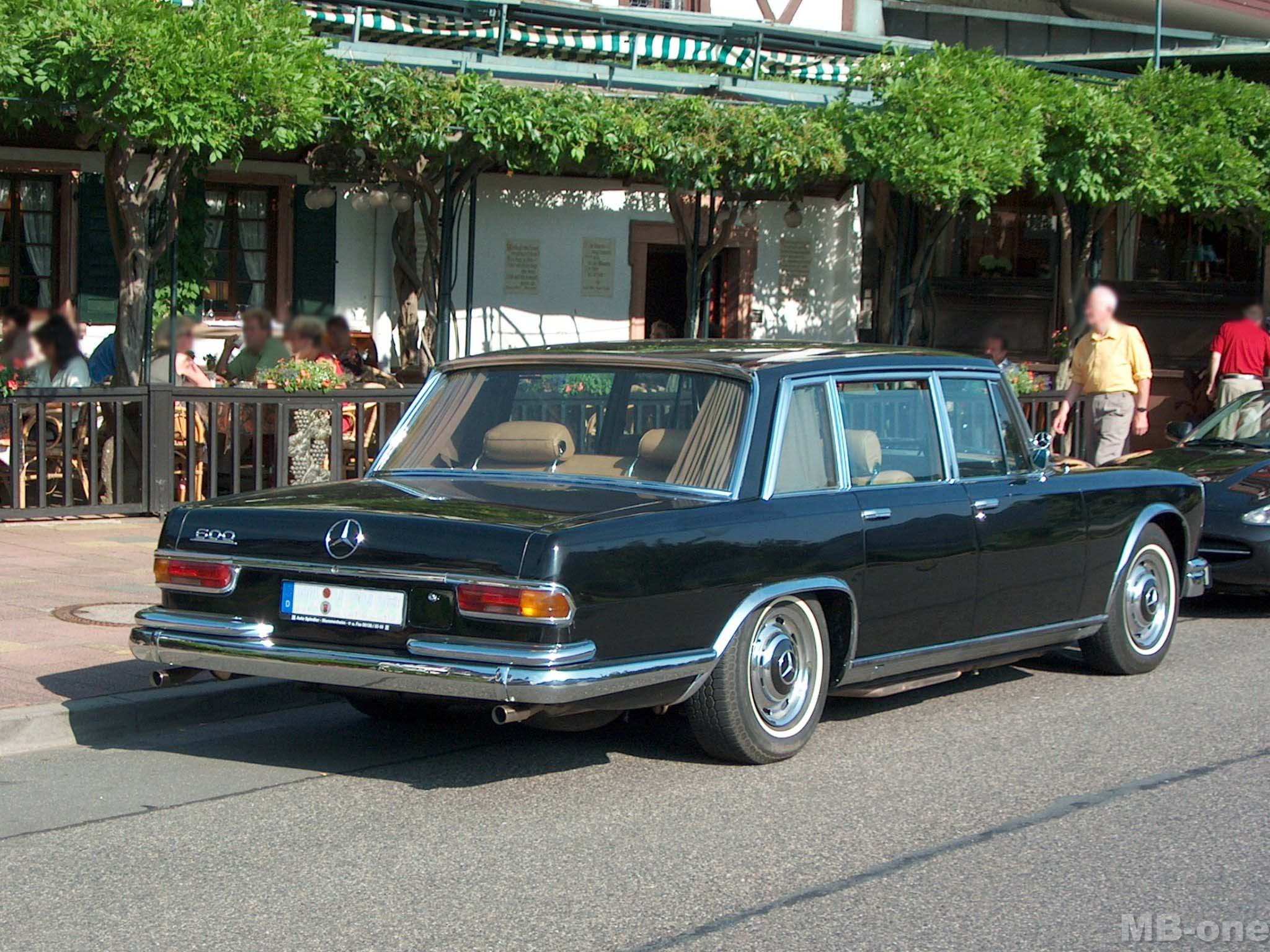 A Mercedes-Benz 600 (W100) in Assmanshausen (Rhine).